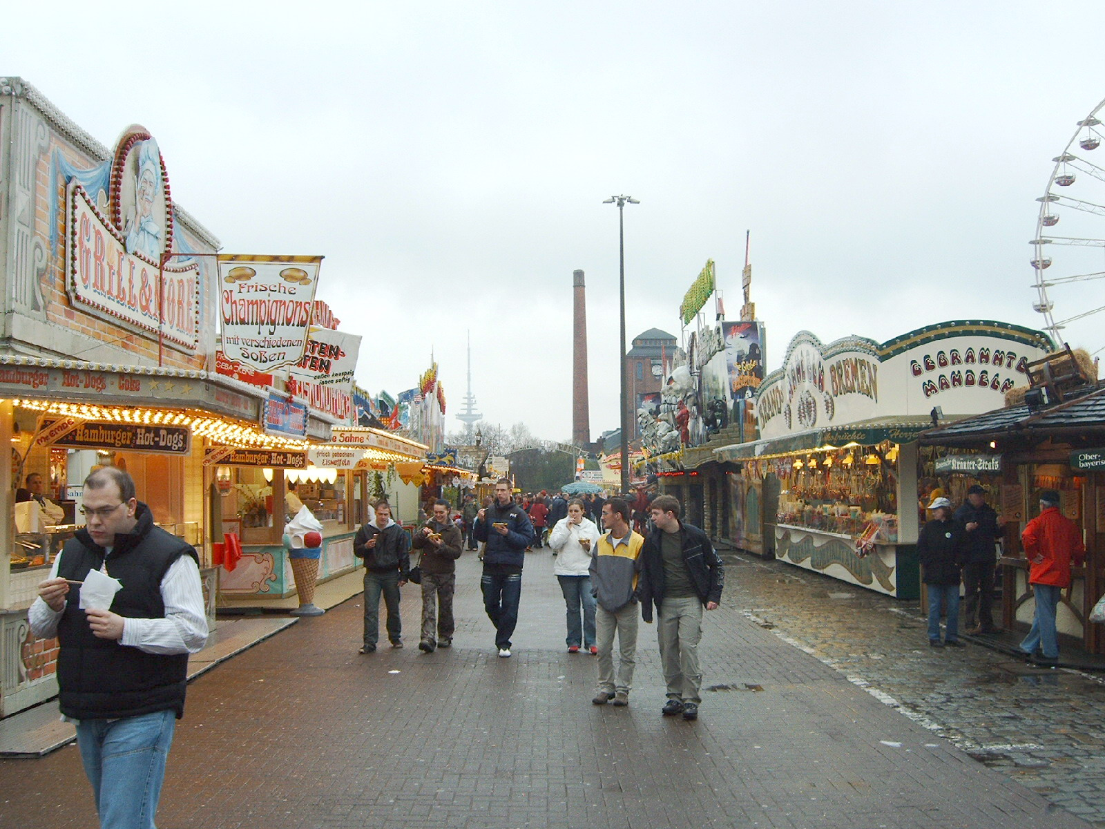 ブレーメン・フライマルクト（2006年）.